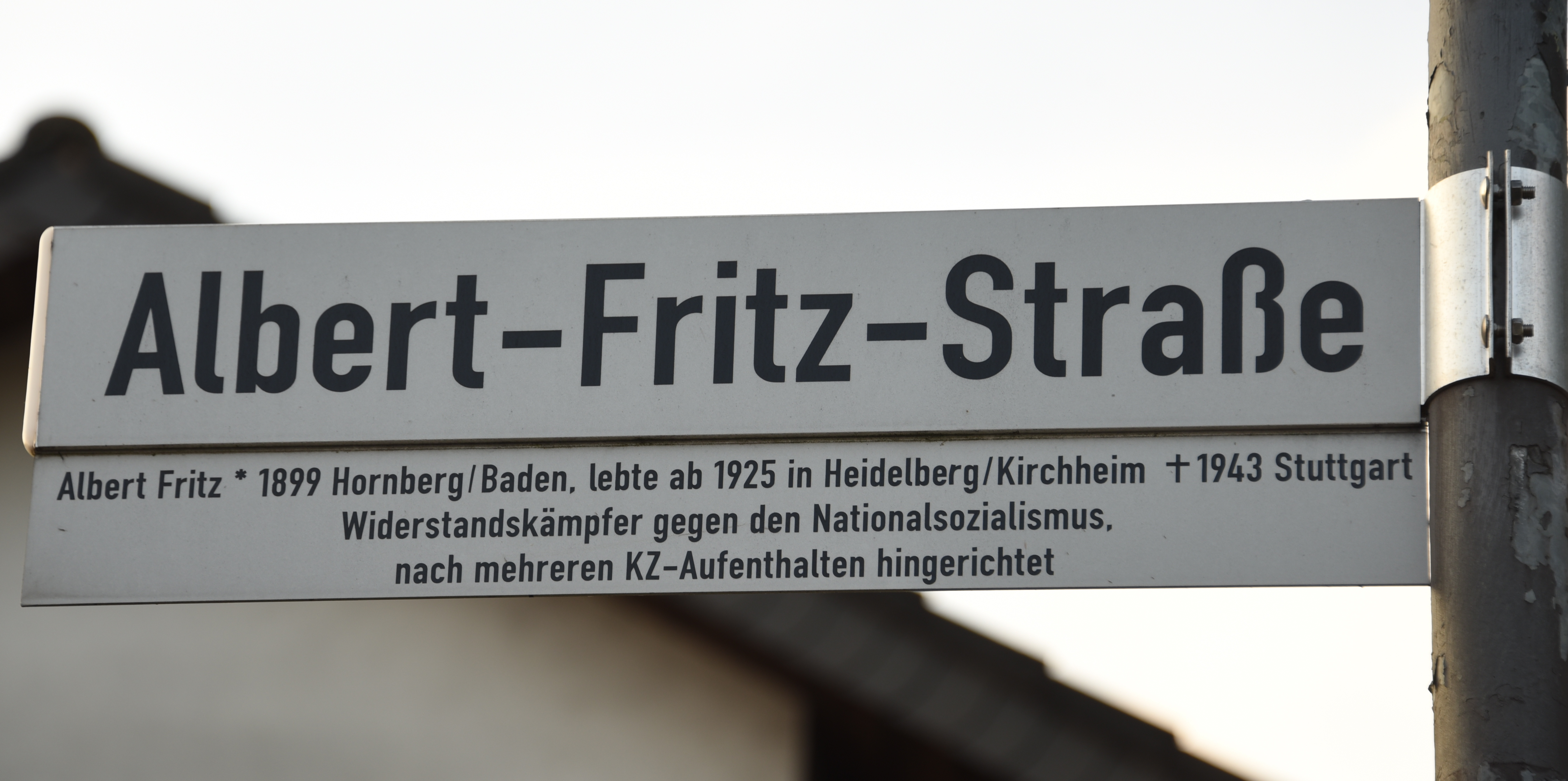 Street-Sign Albert-Fritz-Straße